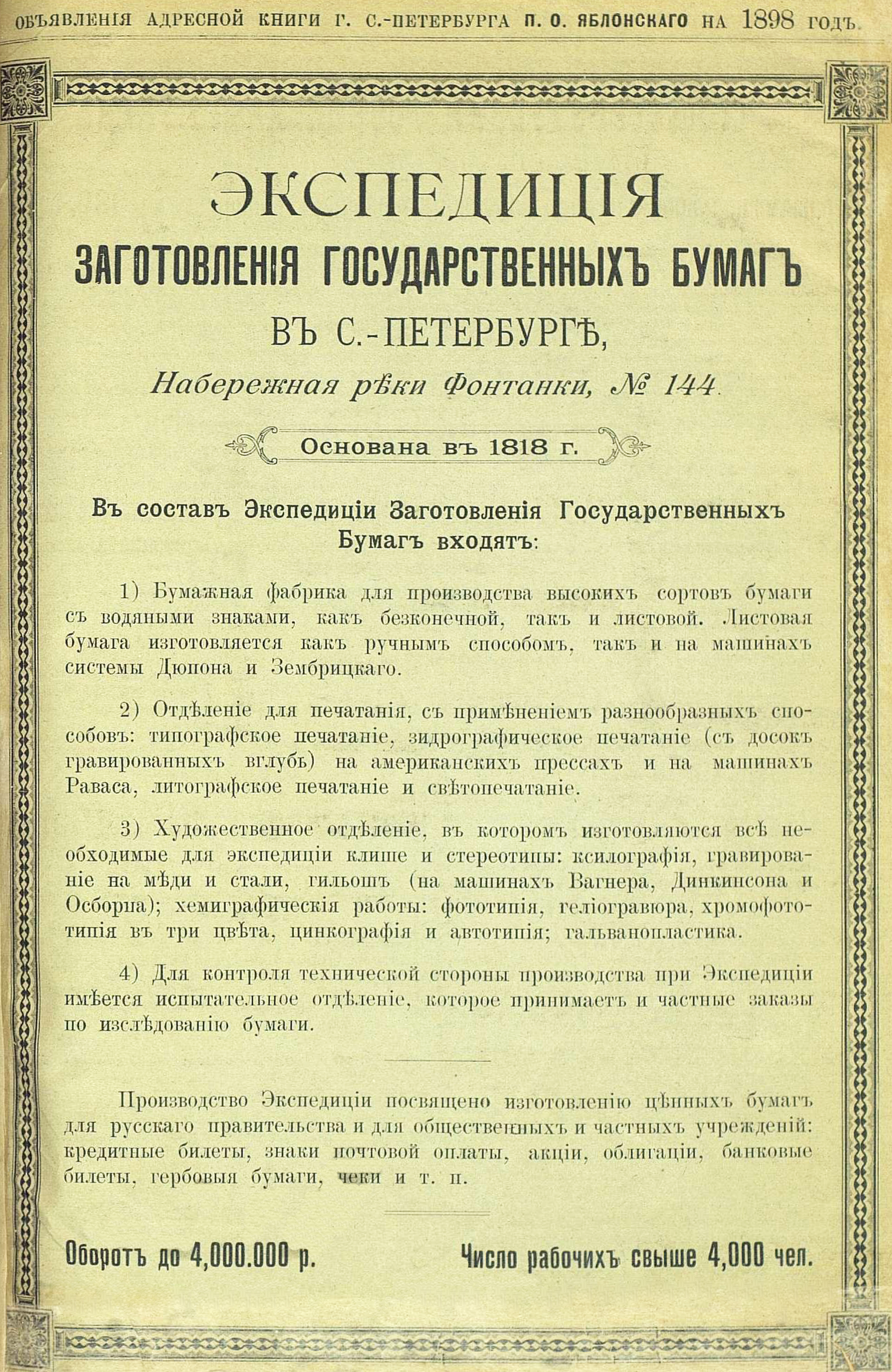 Реклама Экспедиции заготовления государственных ценных бумаг, 1898 год.